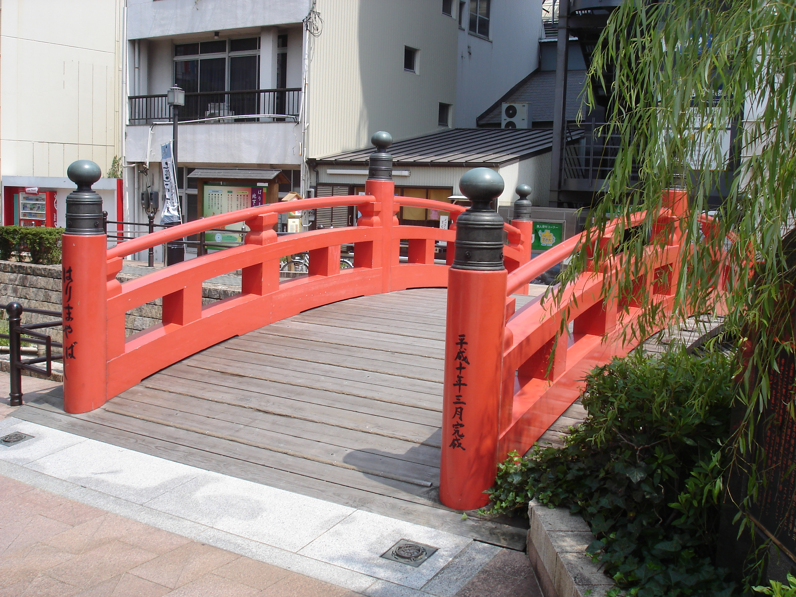 Harimayabashi in Kochi, Japan